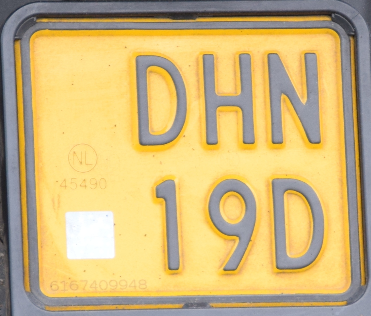 Sidecode 11